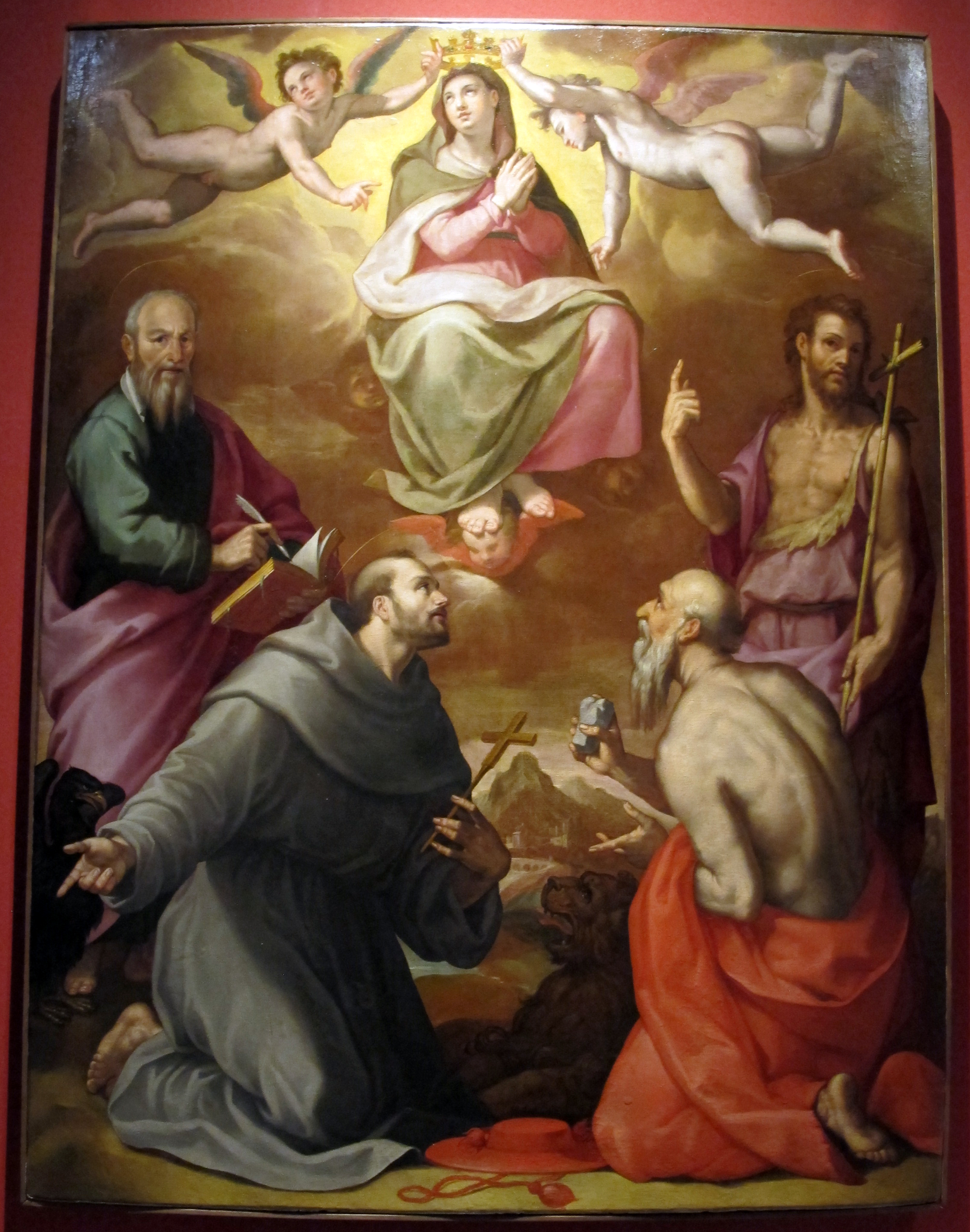 Figline Valdarno